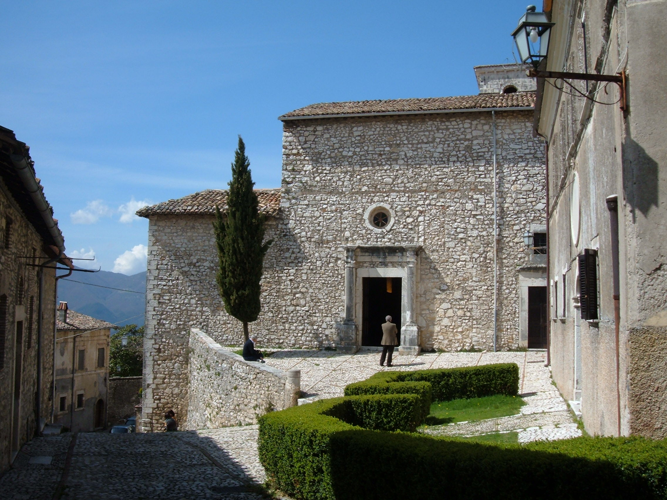 Chiesa di Santa Maria Maggiore, in Labro (provincia di Rieti).